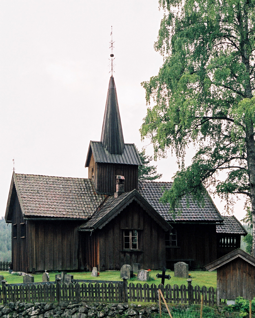 Vatnås church, Sigdal, Buskerud, Norway.